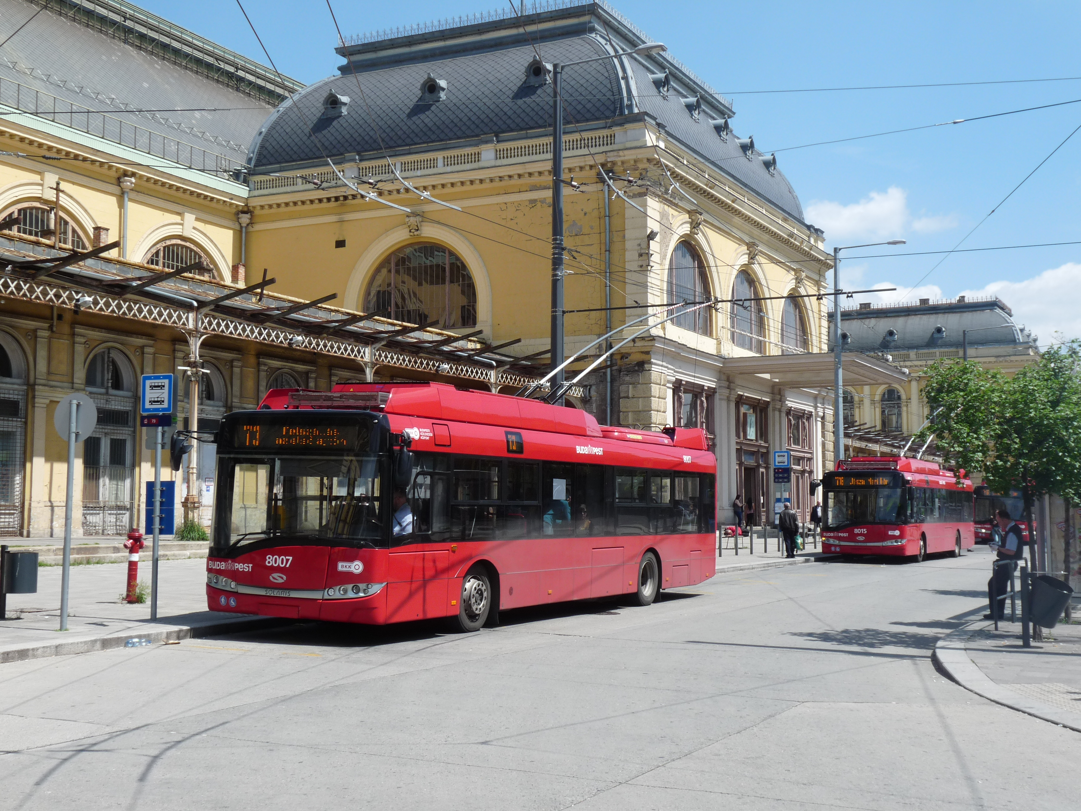 Trolleybuslijn 73 bij Keleti station Solaris Trollino 12 or 15?